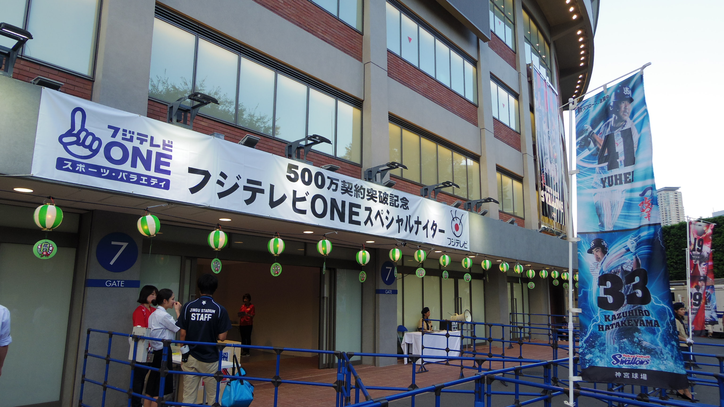 明治神宮野球場。2015年8月15日「ヤクルト×阪神」戦は「フジテレビONEスペシャルナイター」と題して行われた。